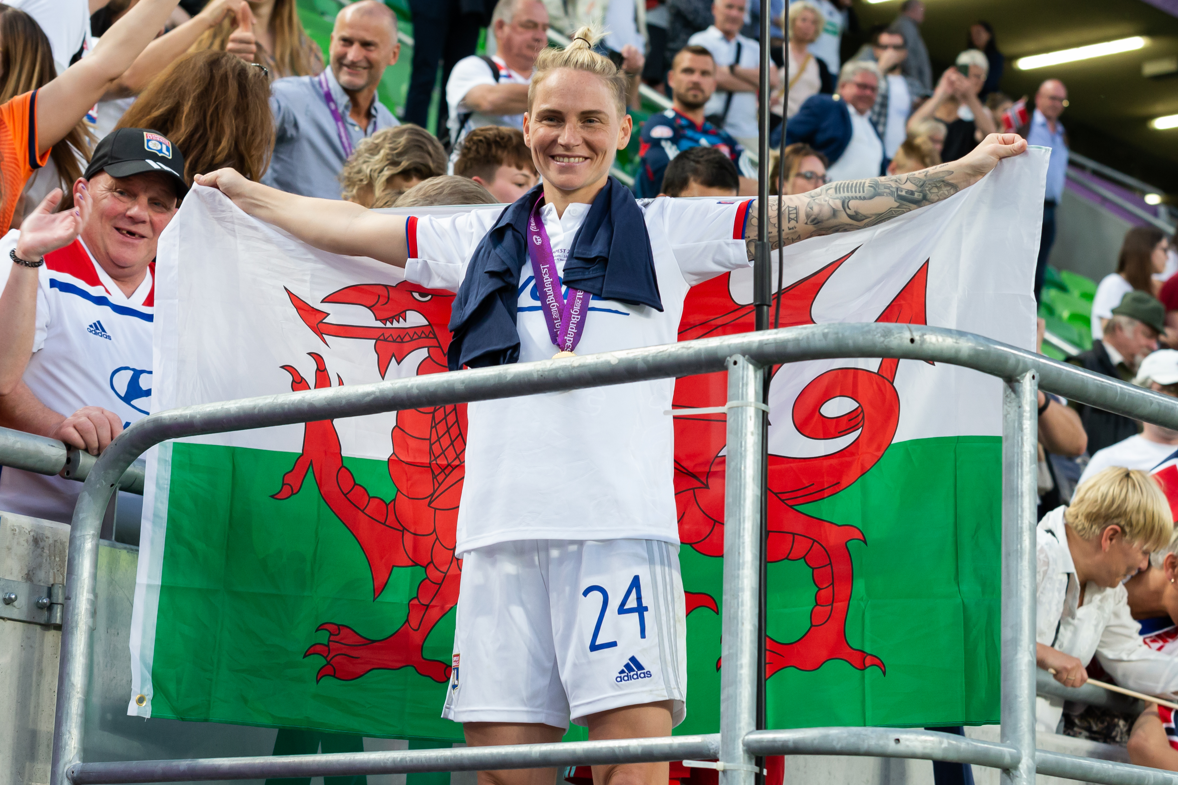 Fußball, Frauen, UEFA Women's Champions League, Olympique Lyonnais - FC Barcelona; Jessica Fishlock (Olympique Lyon, 24) mit der Fahne von Wales